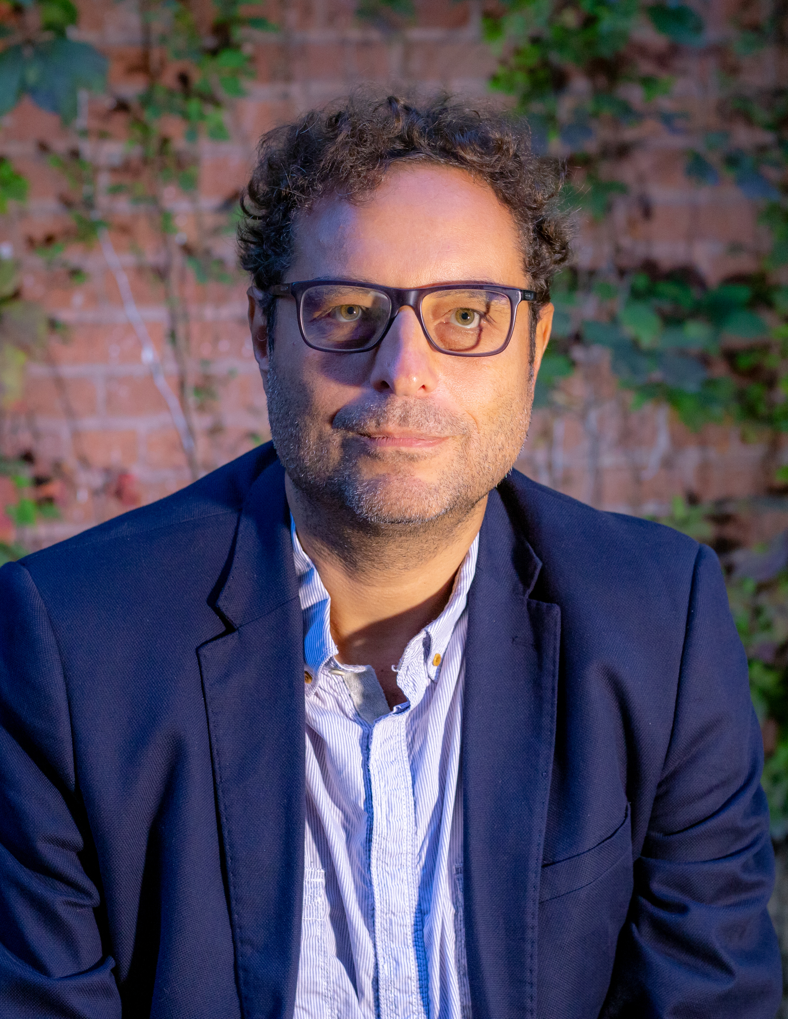 Portrait de Theodore Ushev réalisé lors du lancement des Sommets du cinéma d'animation à la Cinémathèque québécoise.